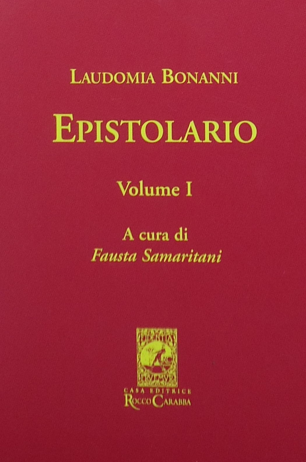 Copertina di un libro pubblicato nel 2006 a Lanciano, da Rocco Carabba editore (part.)